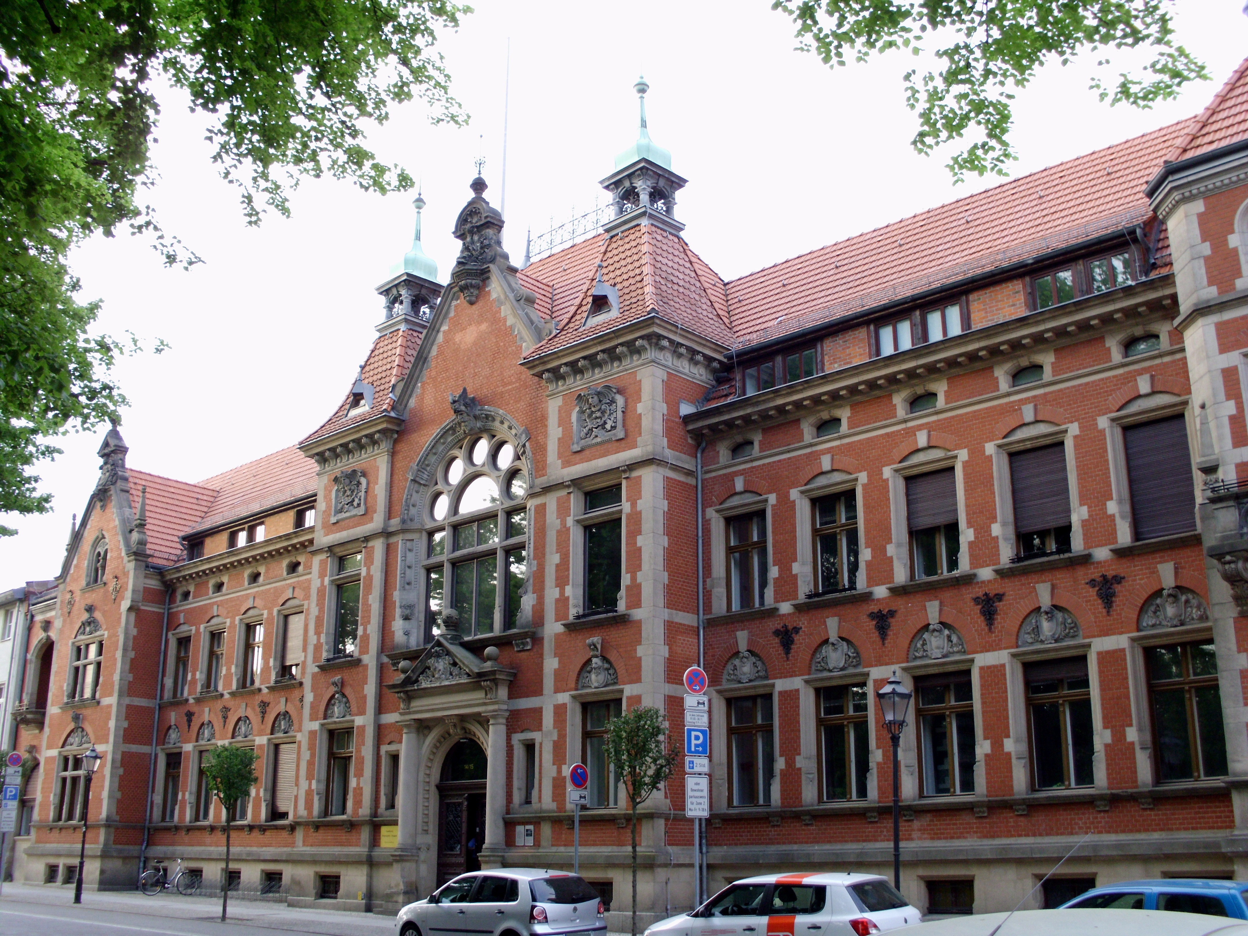 Landratsamt (heute Kreisverwaltung), Virchowstraße 14/15, Neuruppin, Brandenburg, Deutschland